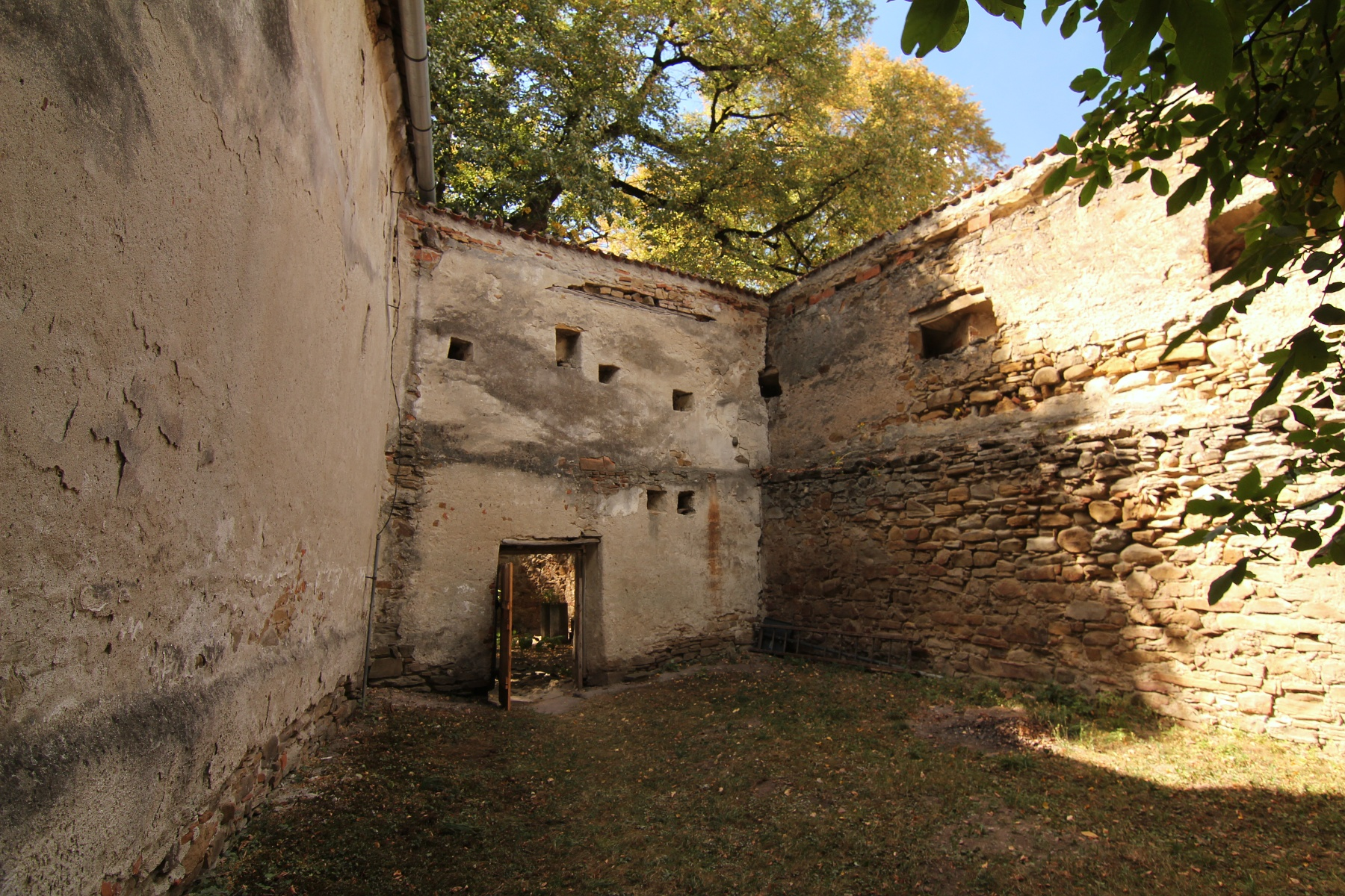 Incintă fortificată, cu trei turnuri șiturnde poartă, zwinger cu intrare fortificatășiturn 02